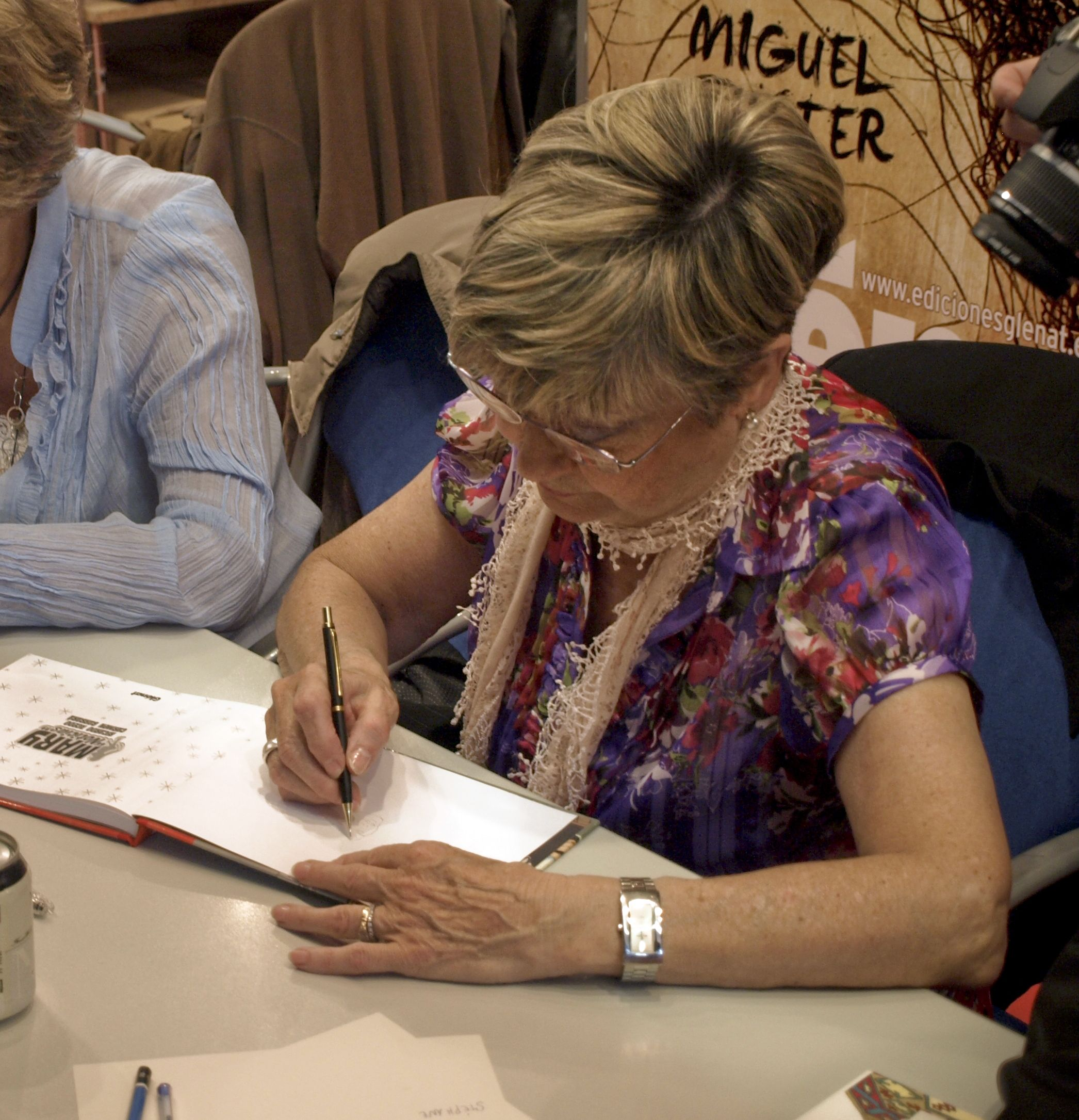 Carmen Barbará, signant exemplars del còmic Mary Noticias al 28 Salón del comic de Barcelona de l'any 2010